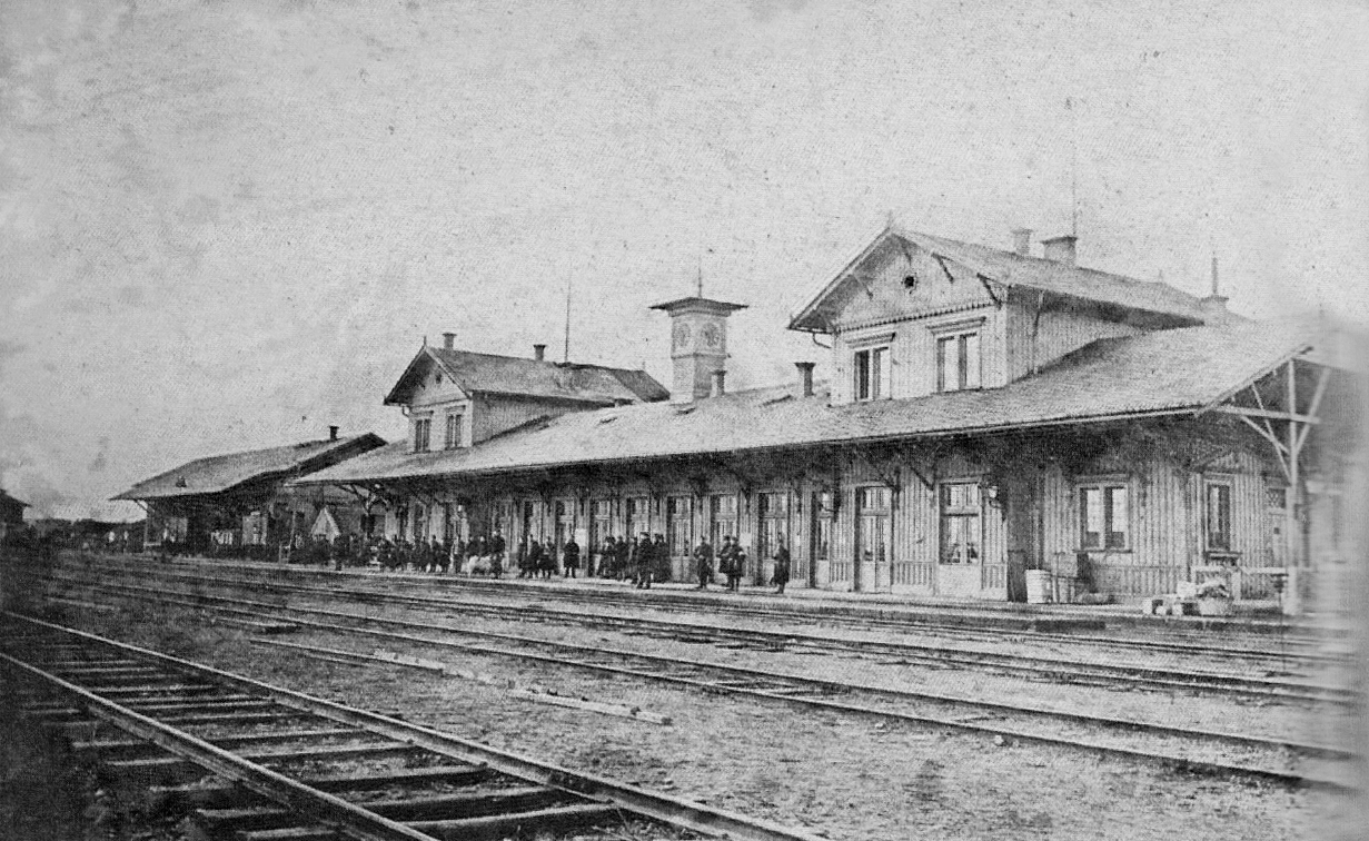 Erstes Empfangsgebäude des Landauer Bahnhofs 1870